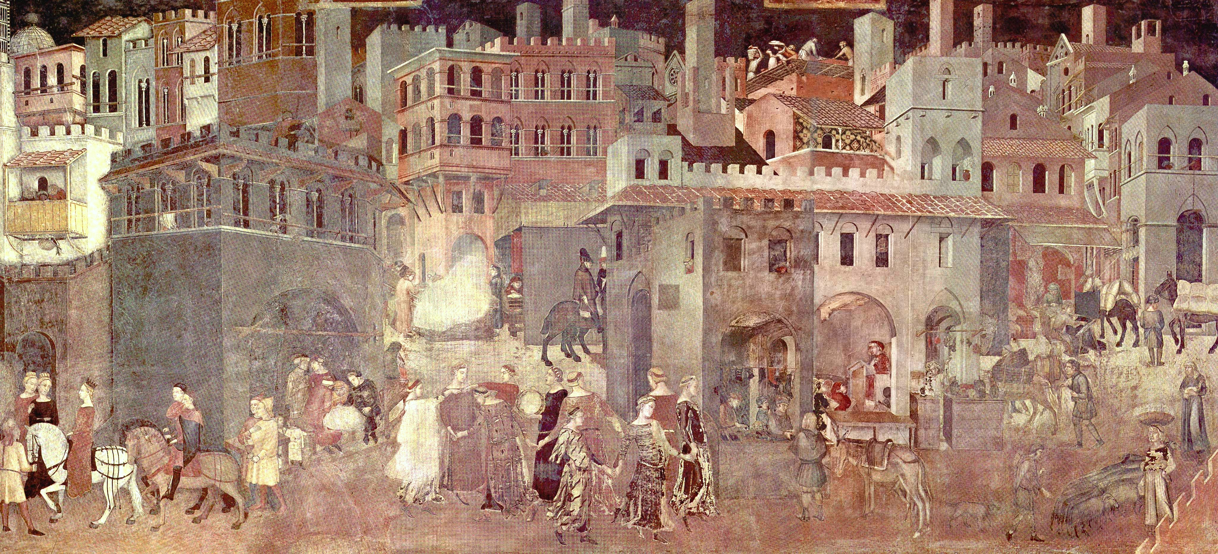 Ambrogio Lorenzetti, The Allegory of Good Government, Palazzo Publico, Siena.